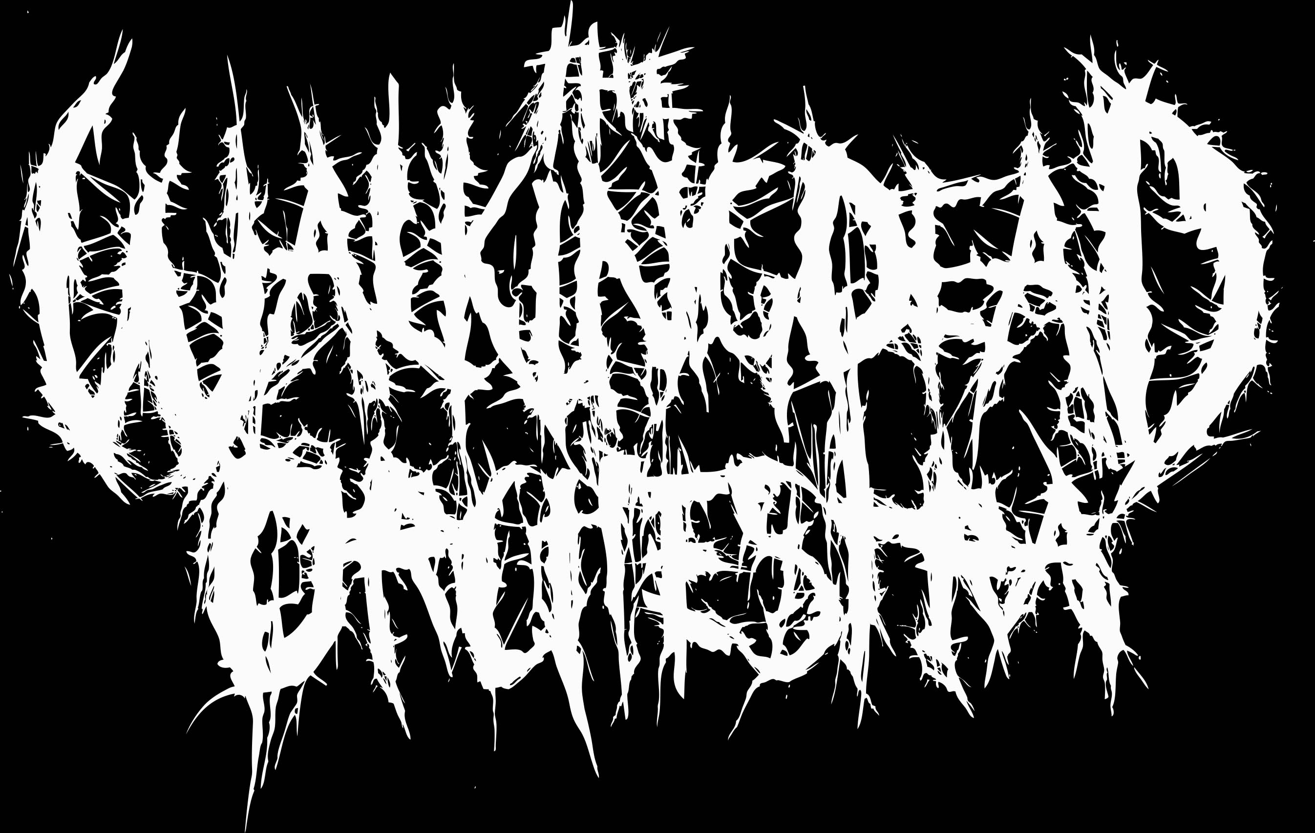 Logo du groupe The Walking Dead Orchestra (2018)